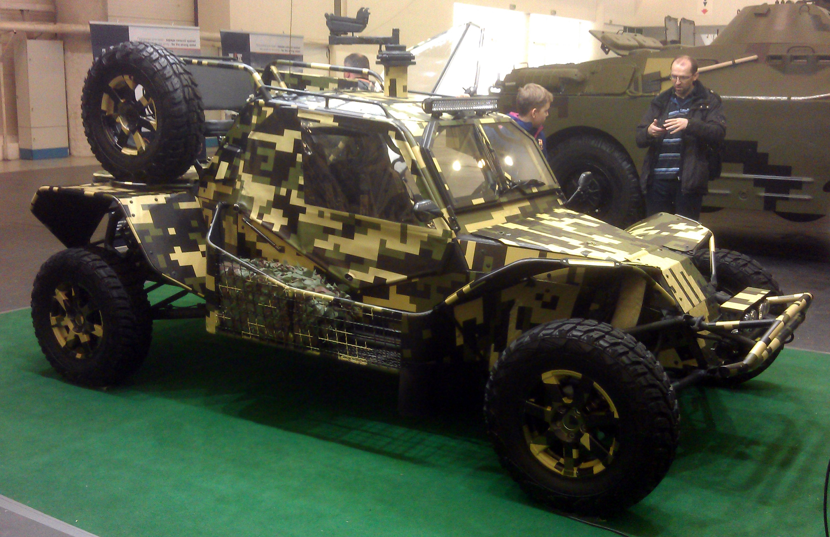 Легкий тактический автомобиль ЛТА на стенде компании Техимпекс. Выставка "Зброя та безпека", Киев, октябрь 2017 г.